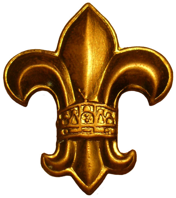 Hungarian metal Scout badge, Magyar Cserkészszövetség, 1990s manufacture of 1930s design